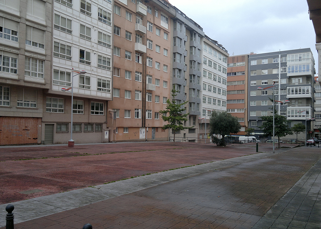 Rúa Luis Díaz González (A Coruña).